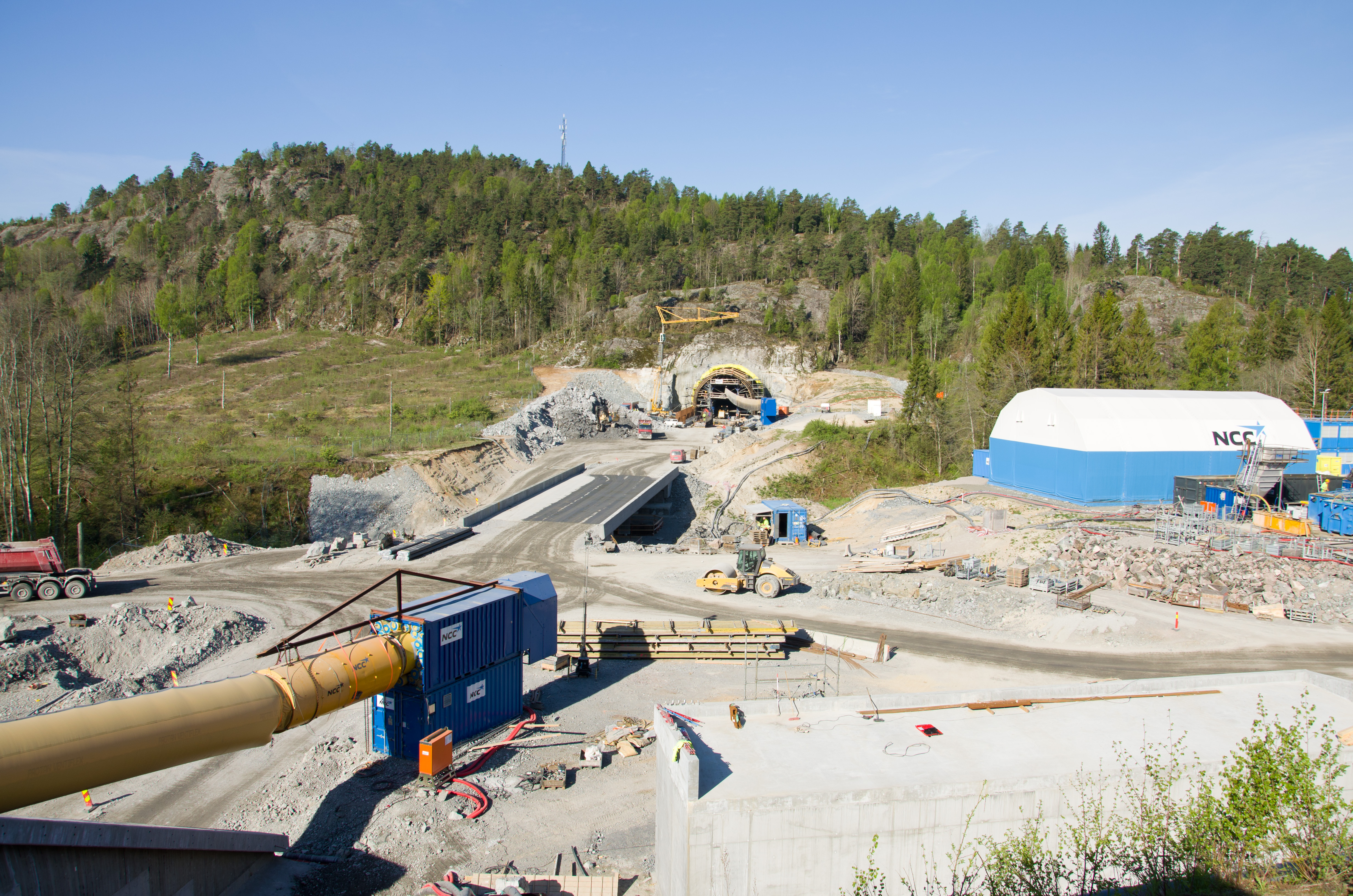 Eidangertunnelens østre innslag, april 2014. Porsgrunn, Telemark, Norge